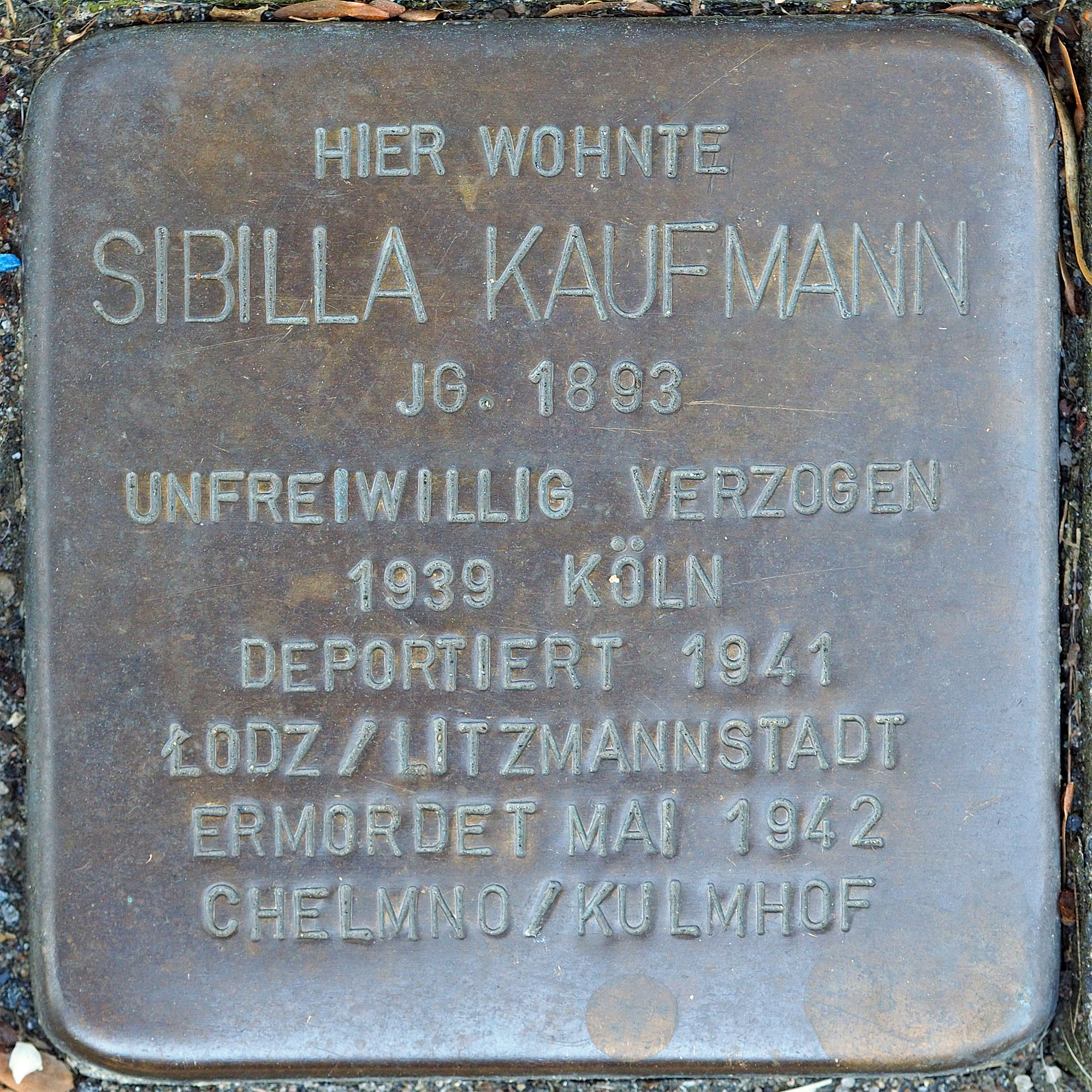 Stolpersteine GV: Kaufmann, Sibilla